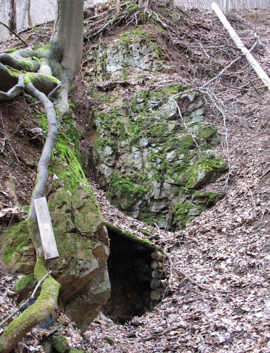 Štola Anna